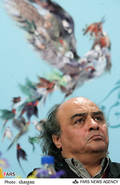 در نشست خبری فیلم وقتی همه خوابیم، بیست و هفتمین دوره‌ی جشنواره‌ی فیلم فجر